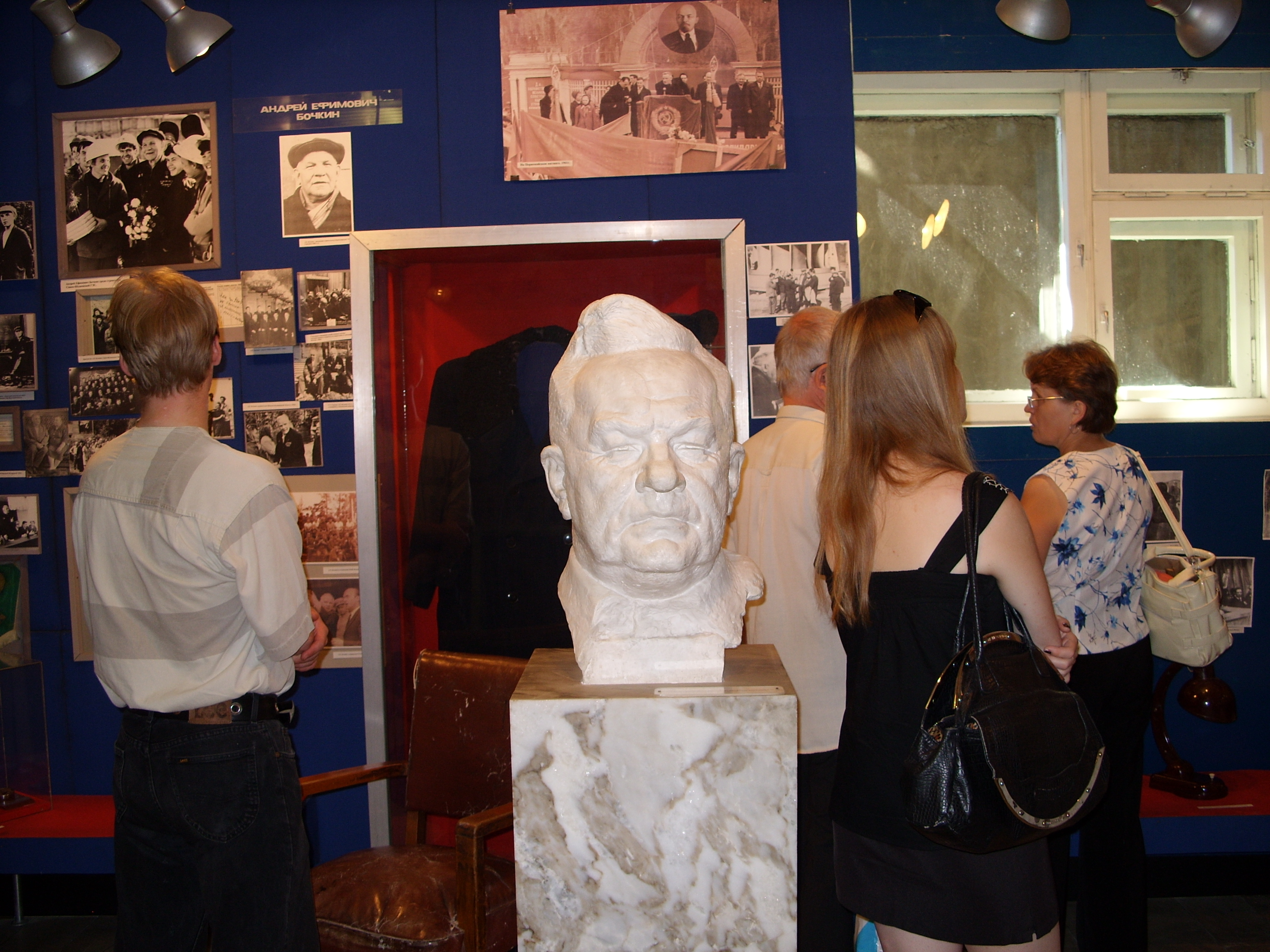 снимки июля 2008 г.